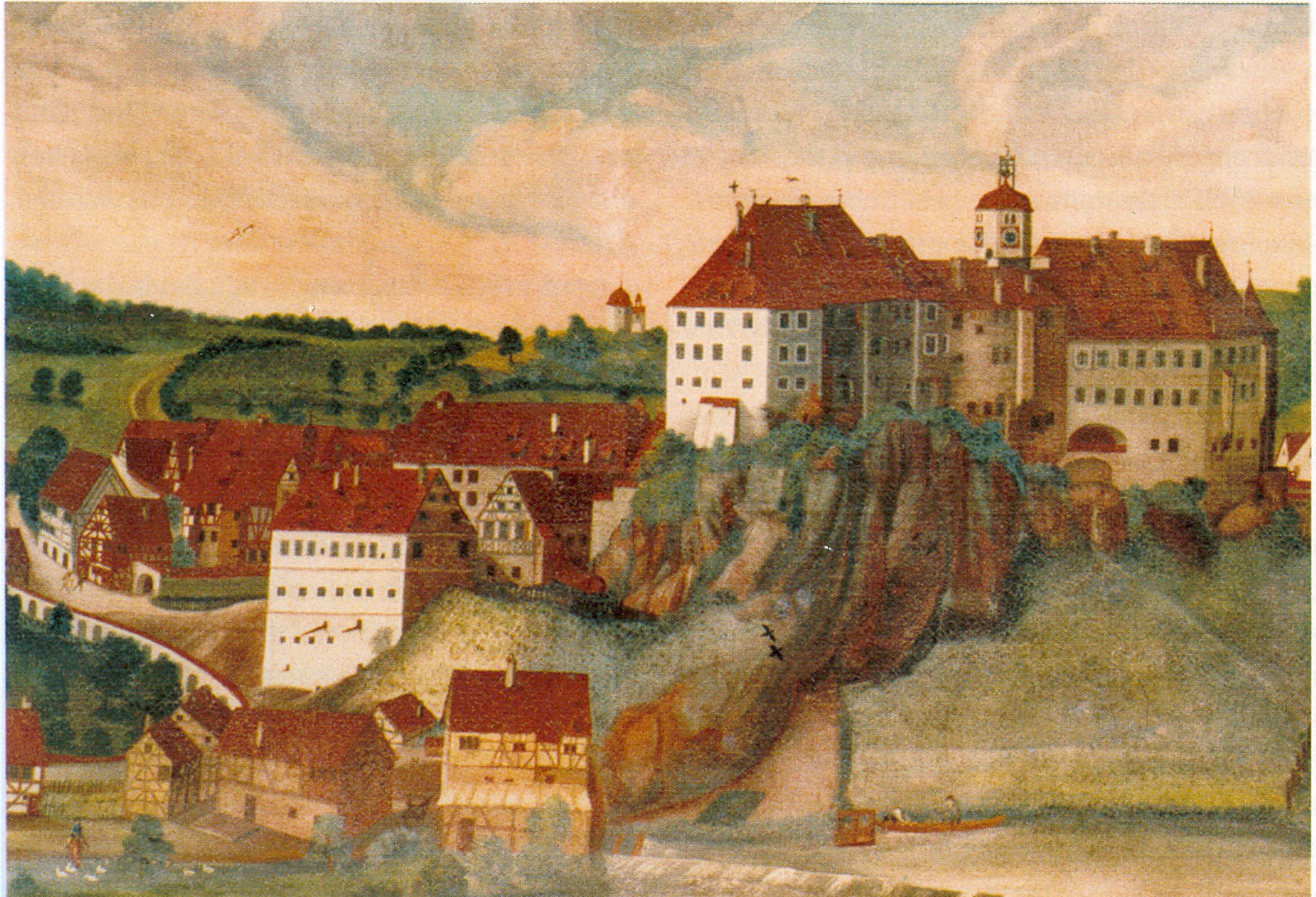 Schloss Sigmaringen mit Stadt und Mühlenvorstadt Öl auf Leinwand